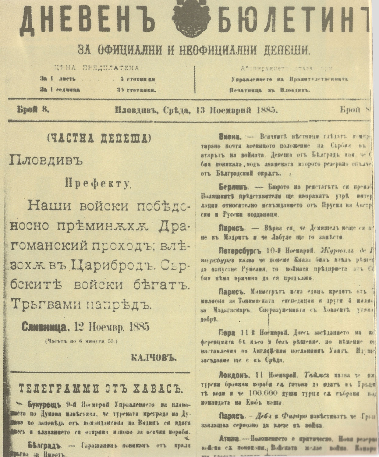 Главата на "Дневен бюлетин", брой 8.